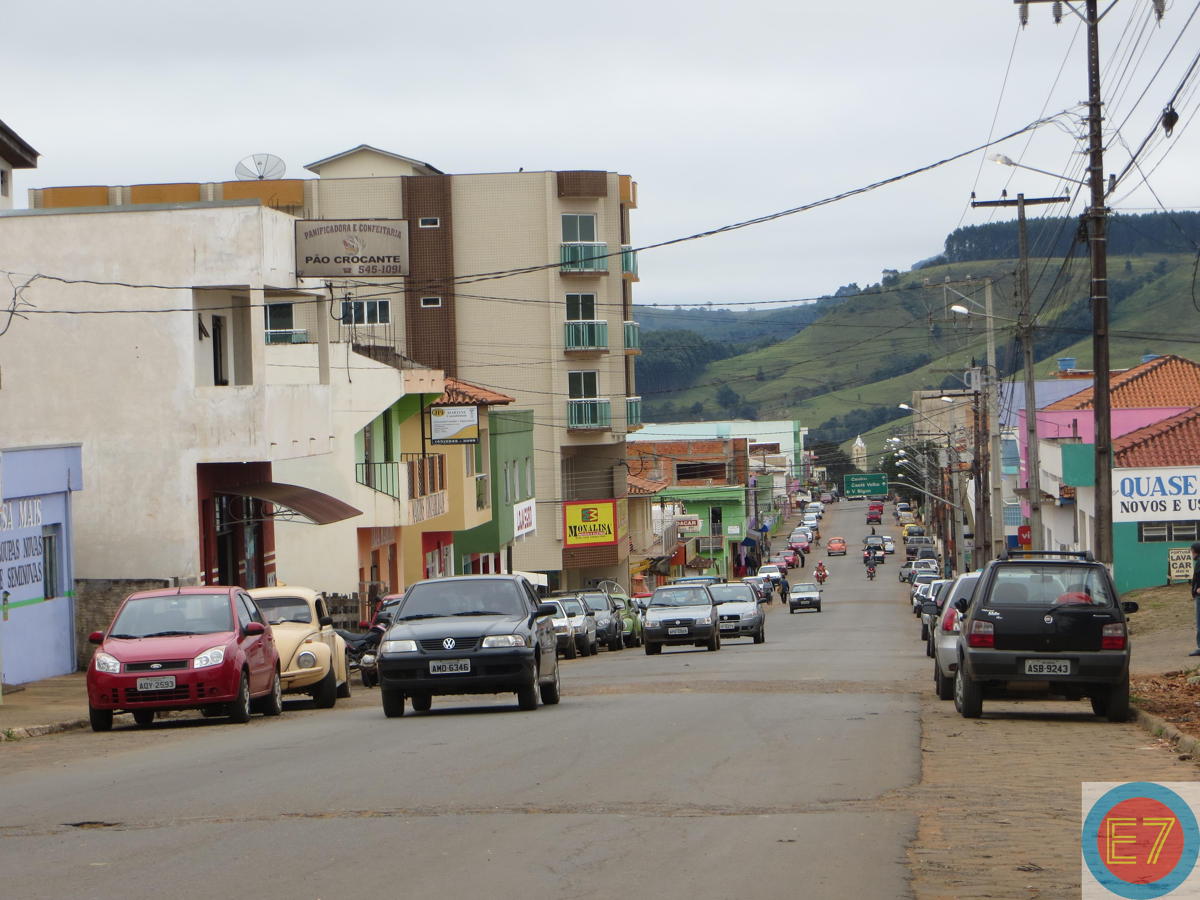 Comércio na Avenida Central de Curiúva, Estado do Paraná, Brasil.